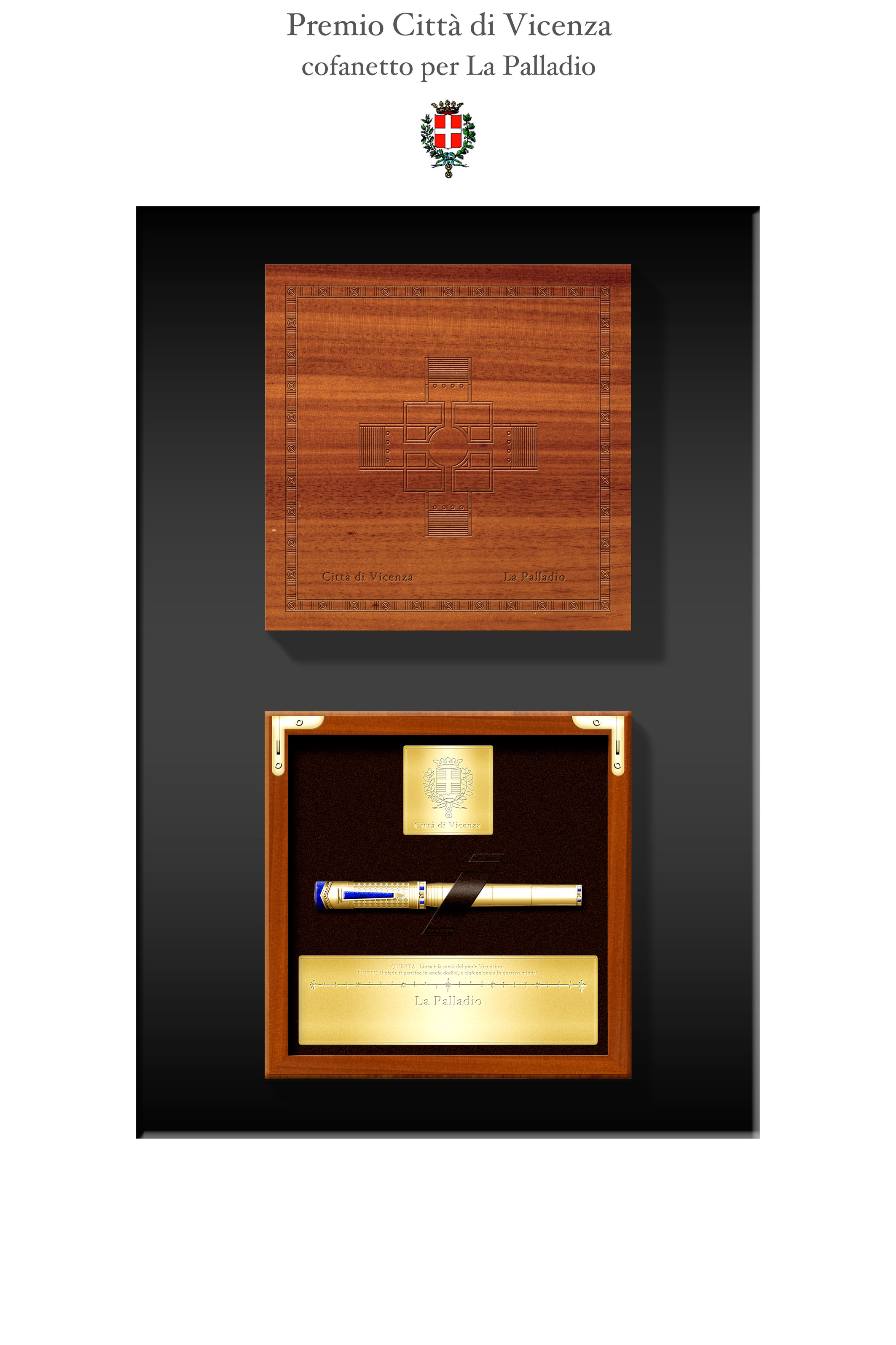 ideazione de "La Palladio d'Oro", premio della Città di Vicenza